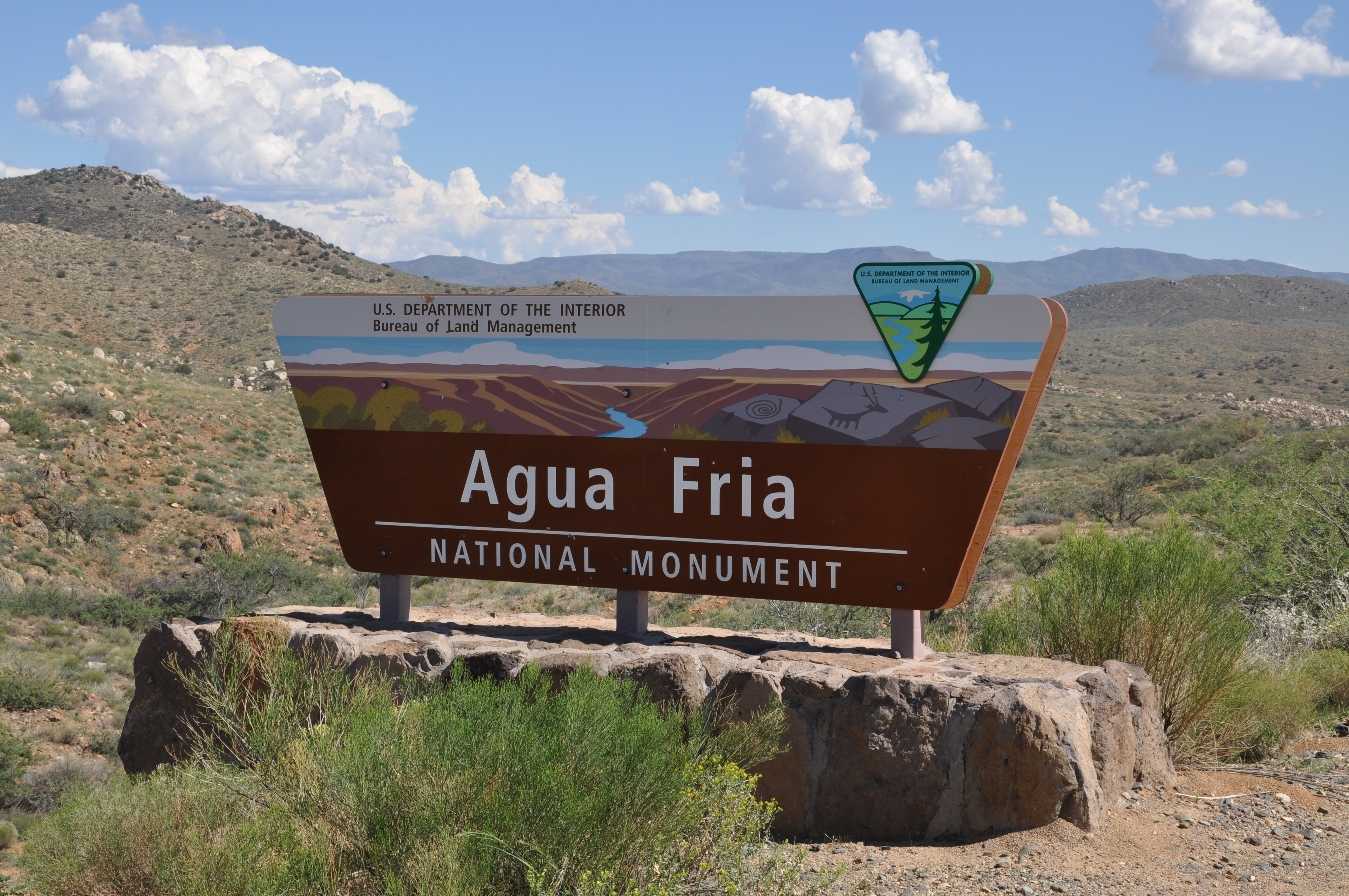 Schild Agua Fria National Monument